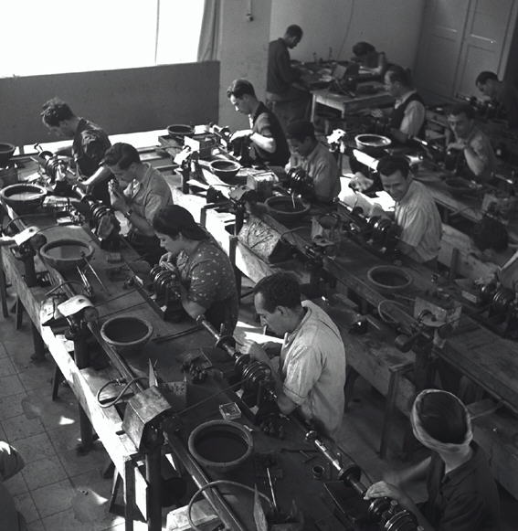 בית חרושת לליטוש יהלומים בנתניה